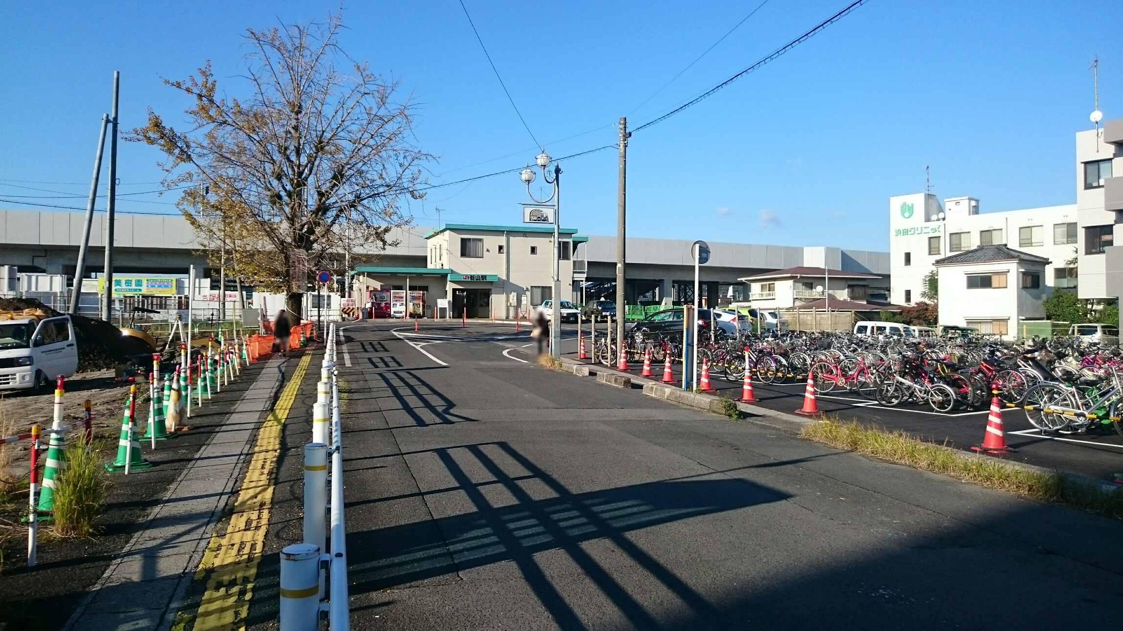 JR谷山駅前の通り（2015年）